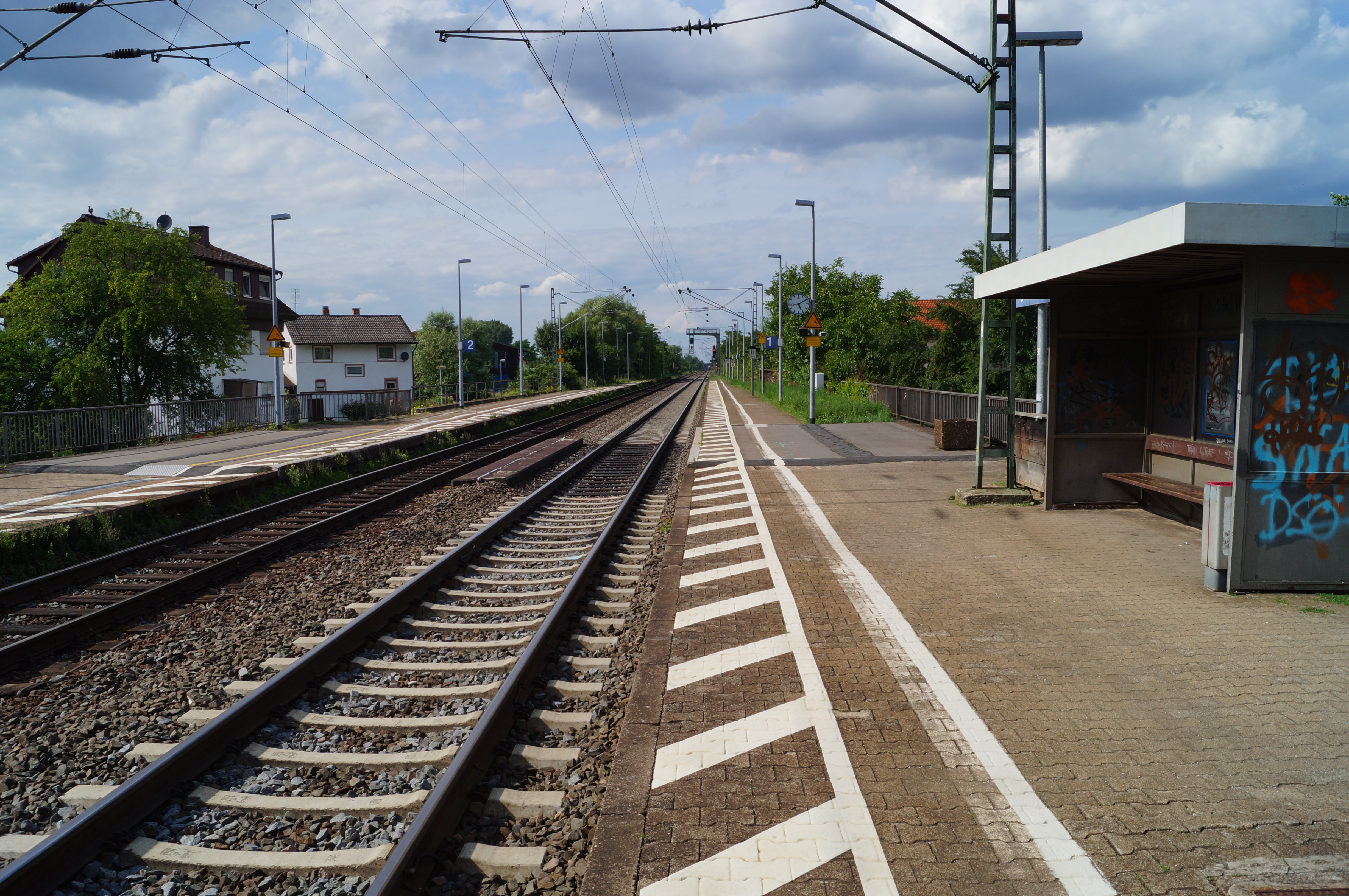 Die Bahnsteige des Bahnhofs Zwingenberg (Bergstraße)